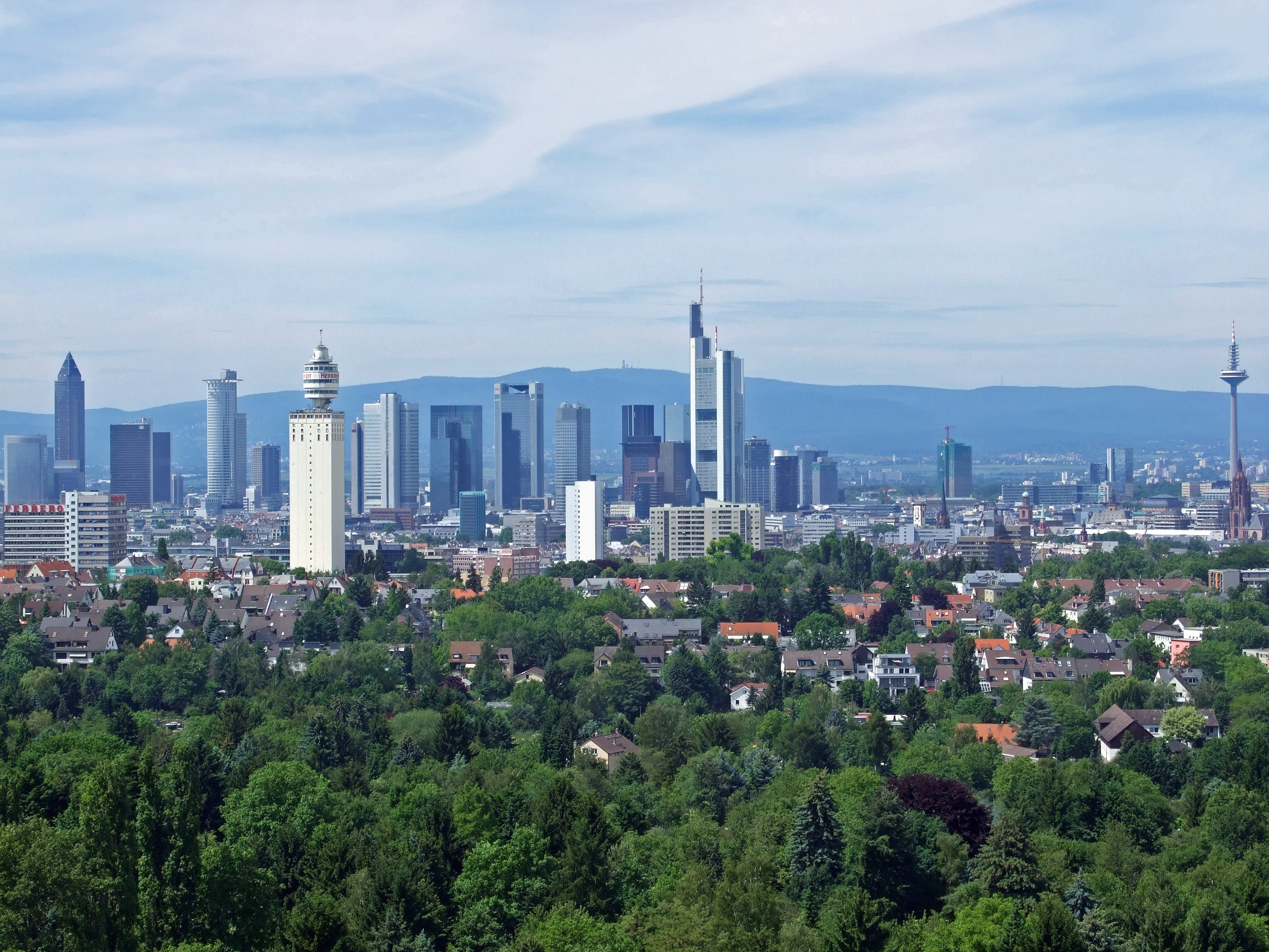 skyline von Frankfurt aus Sueden